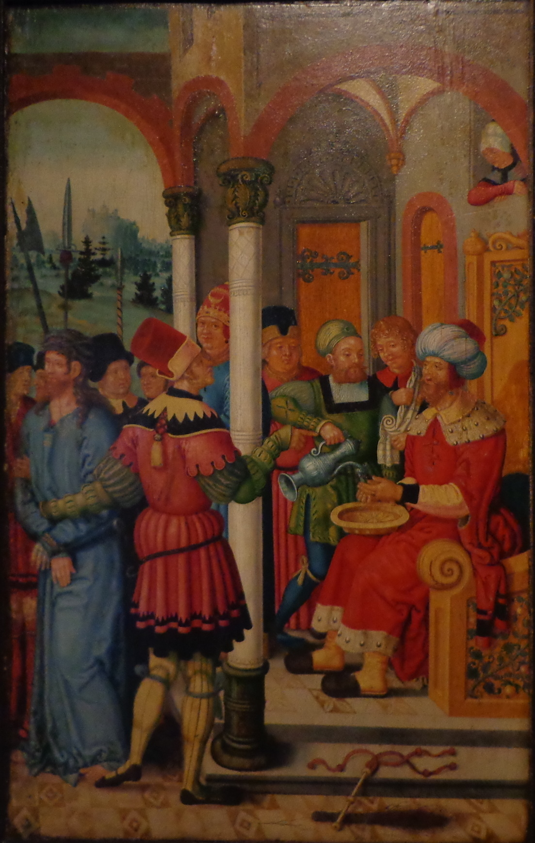 Tableau de Wilhelm Stetter